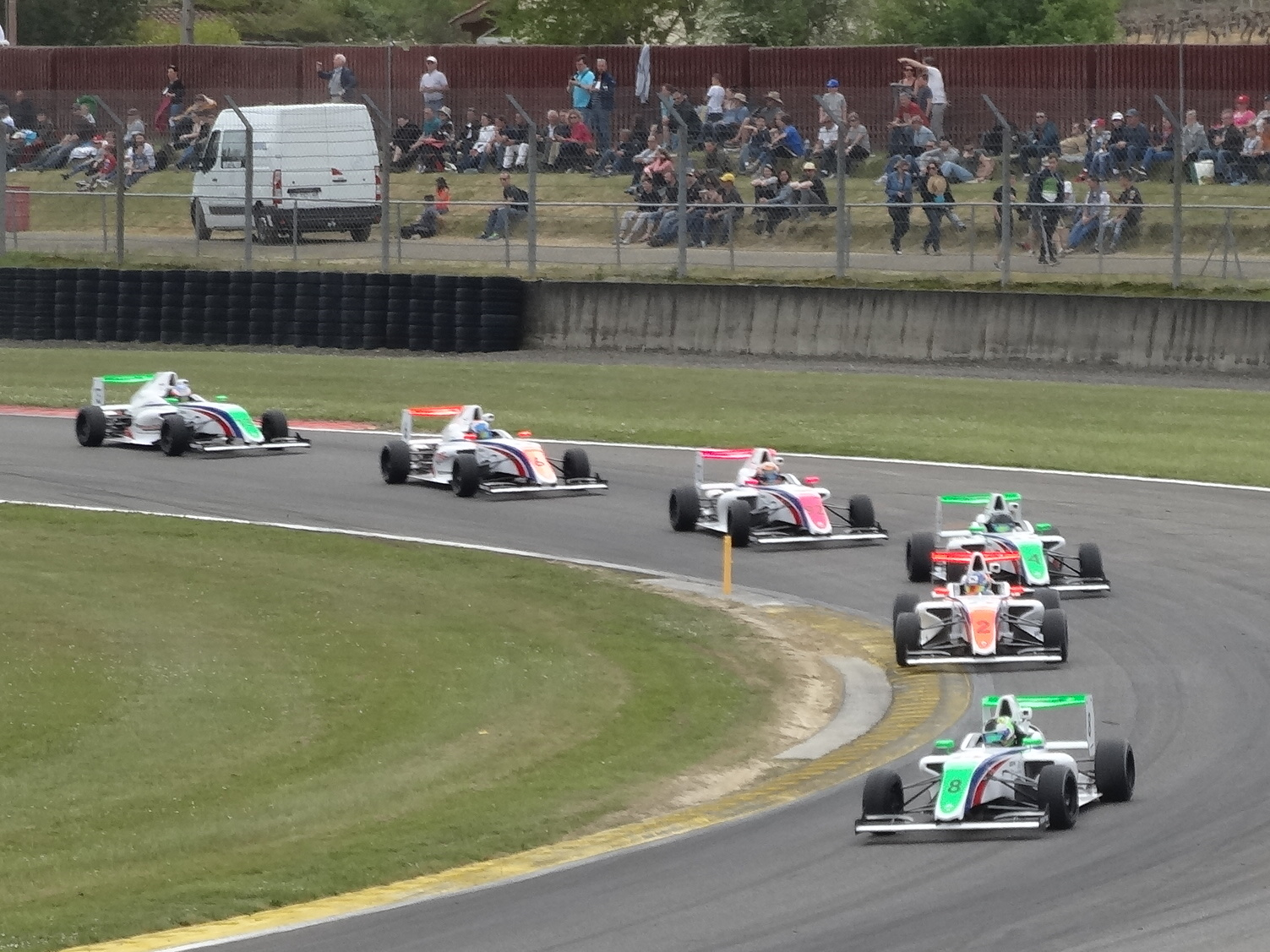 Coupes de Pâques 2017 à Nogaro.